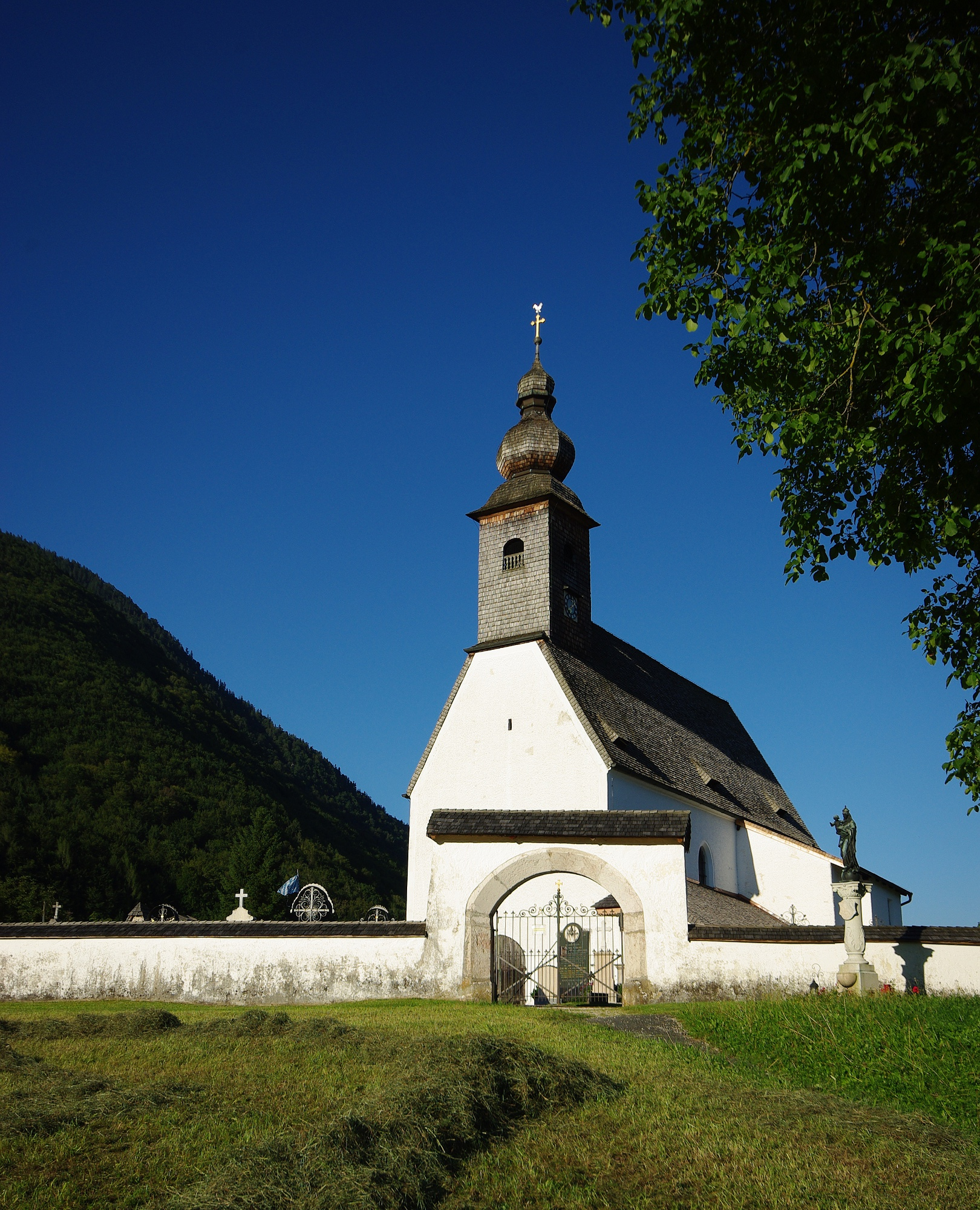 Nonn 44, 83435 Bad Reichenhall Kath. Pfarrkirche St. Georg (Nonn) Ansicht von Westen mit FriedhofseingangThis is a photograph of an architectural monument.